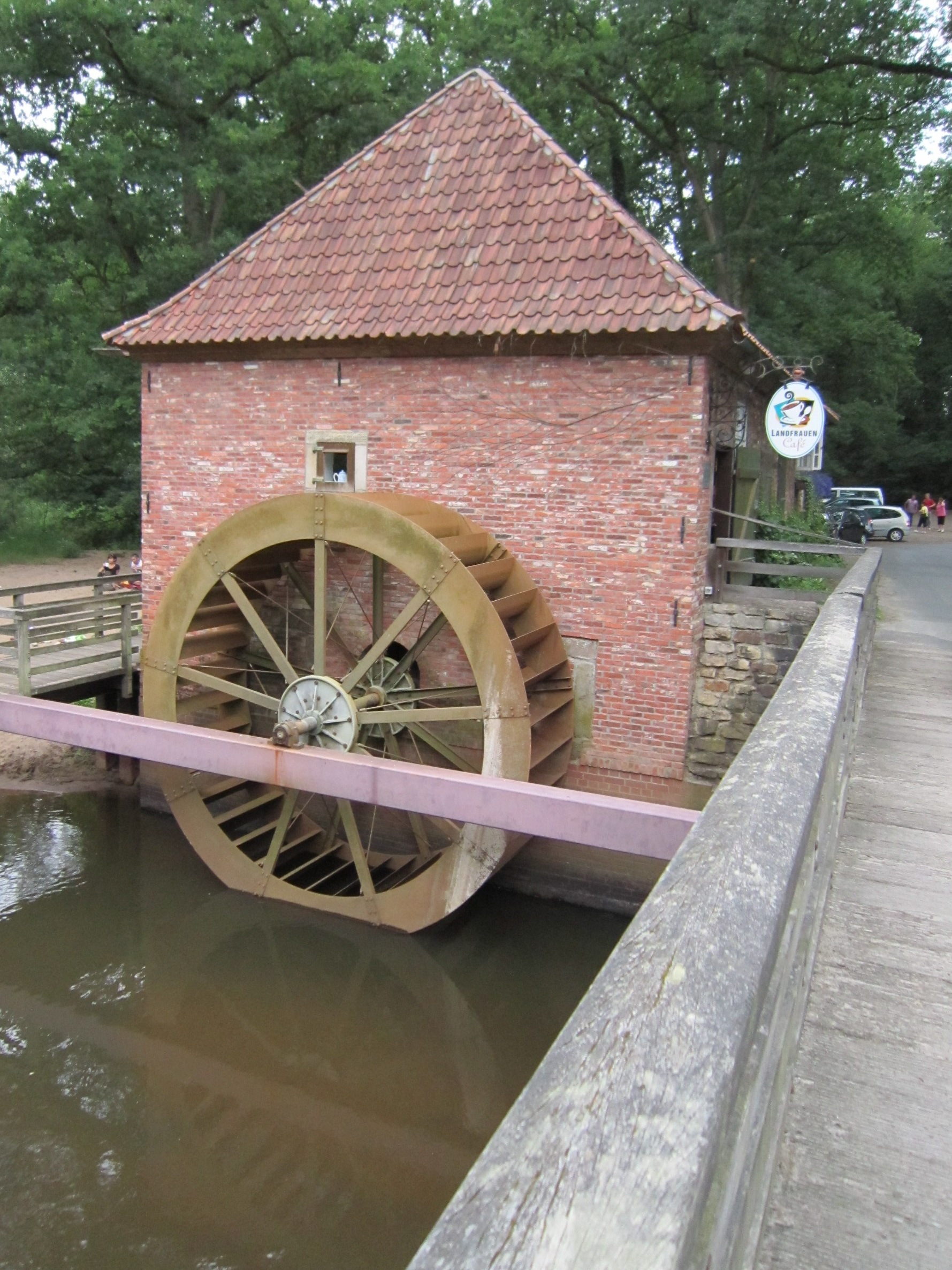 Eitzter Mühle an der Oste (Gemeinde Selsingen, Landkreis Rotenburg/Wümme, Niedersachsen)